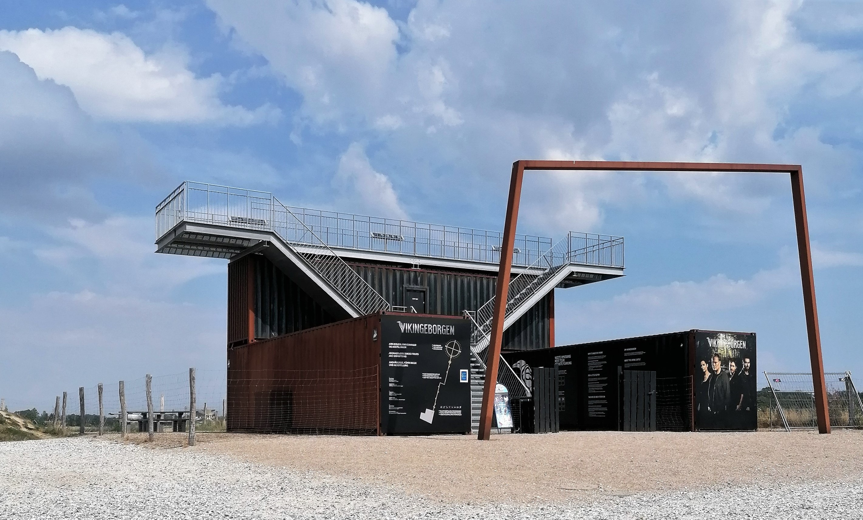 Ingangen til Vikingeborgen eller Borgring.